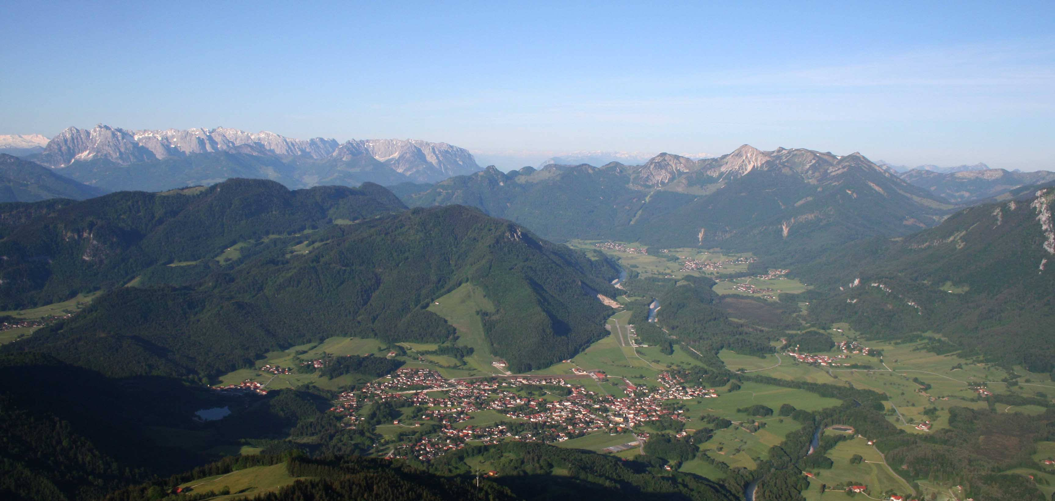 Unterwössen vom Hochgern